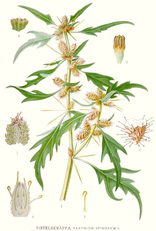 Original Description Tistelskräppa, Xanthium spinosum L.